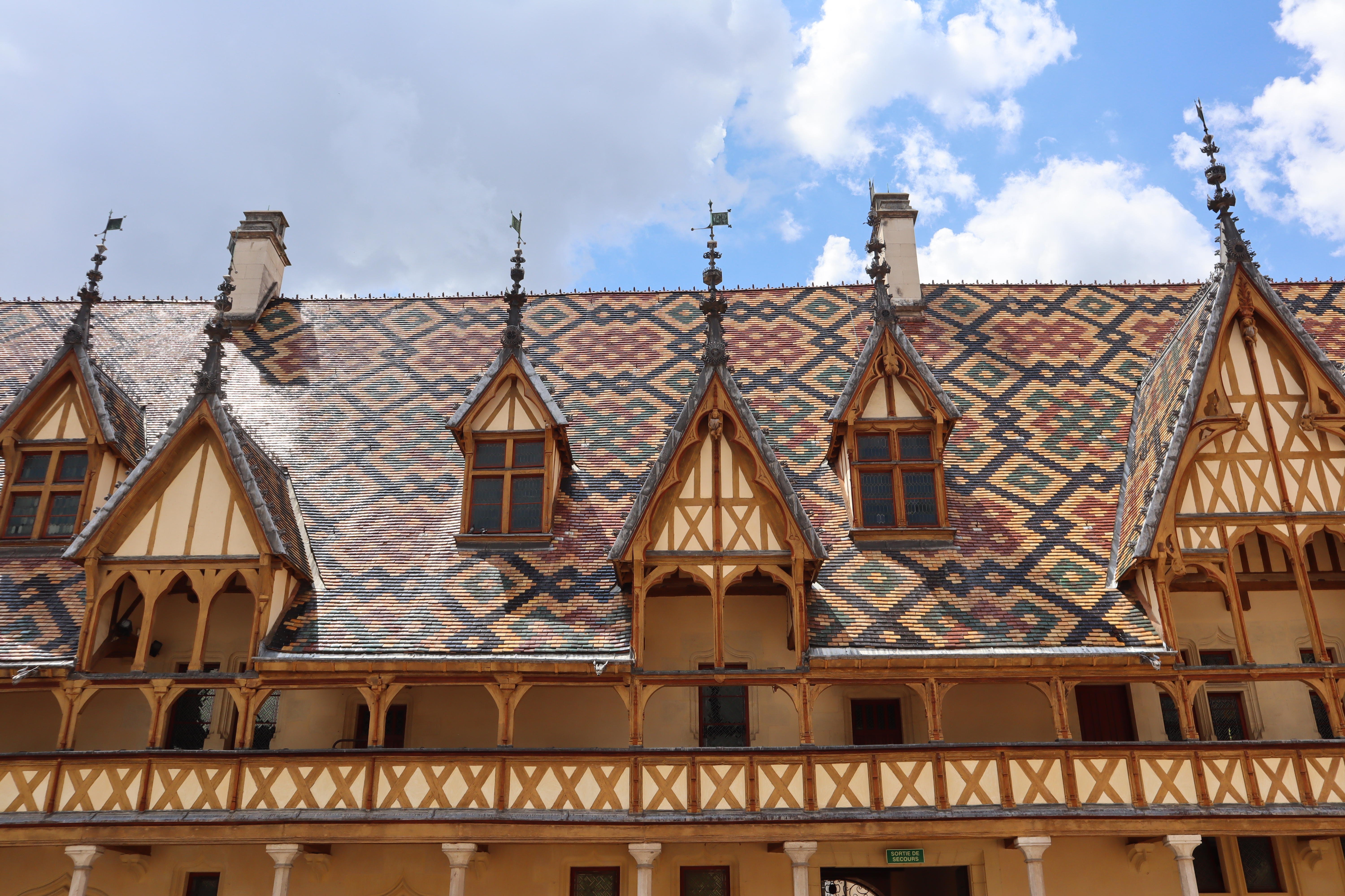 Cour intérieure des Hospices de Beaune (21).